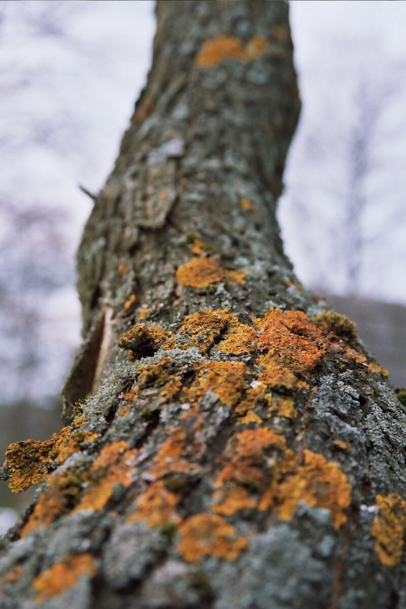 Kora chyba brzozy sfotografowana w Górach Świętokrzyskich w 2005 roku. Foto autorstwa Ewy & Bartka.